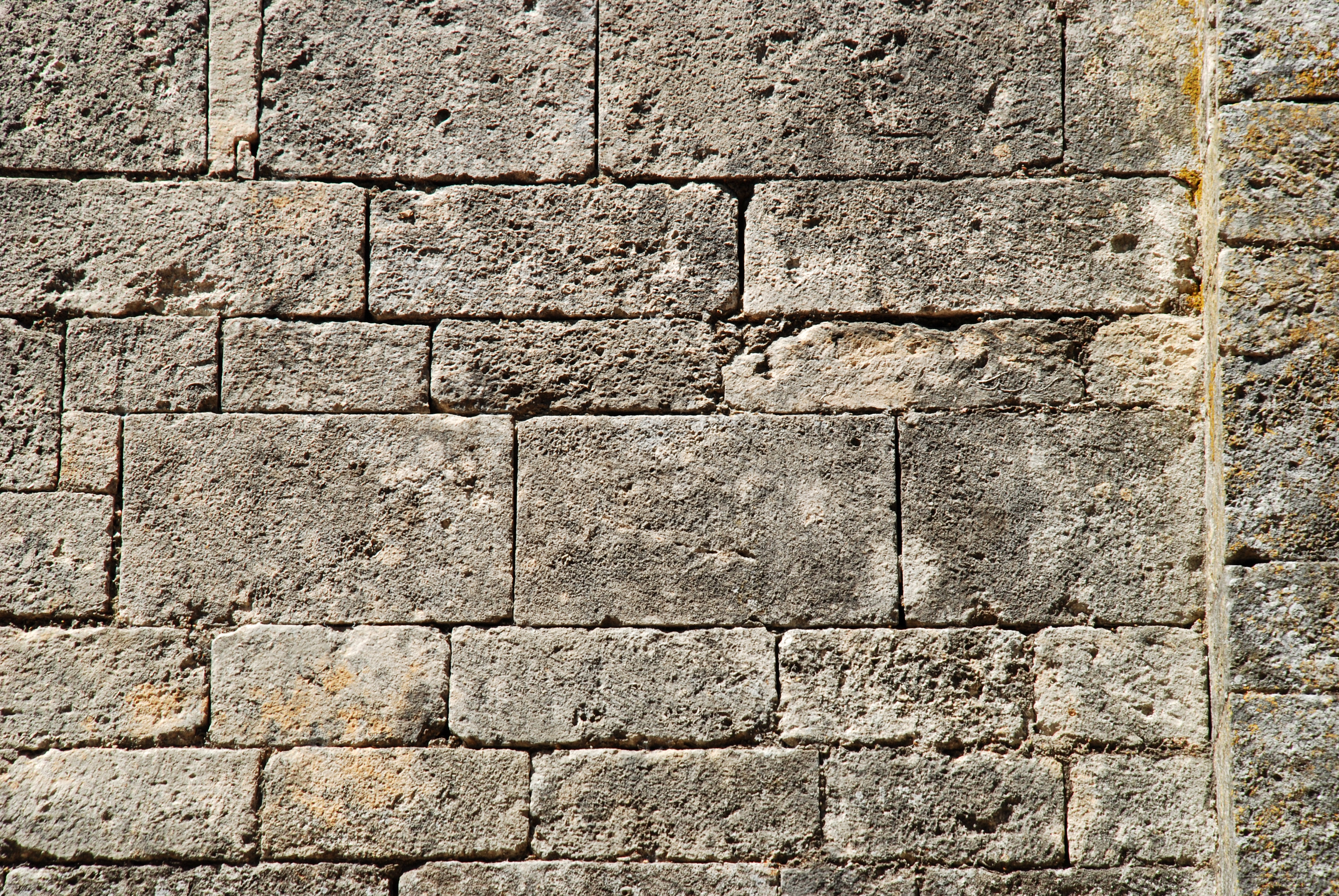 France - Hérault - Chapelle Notre-Dame-de-la-Pitié de Beaulieu